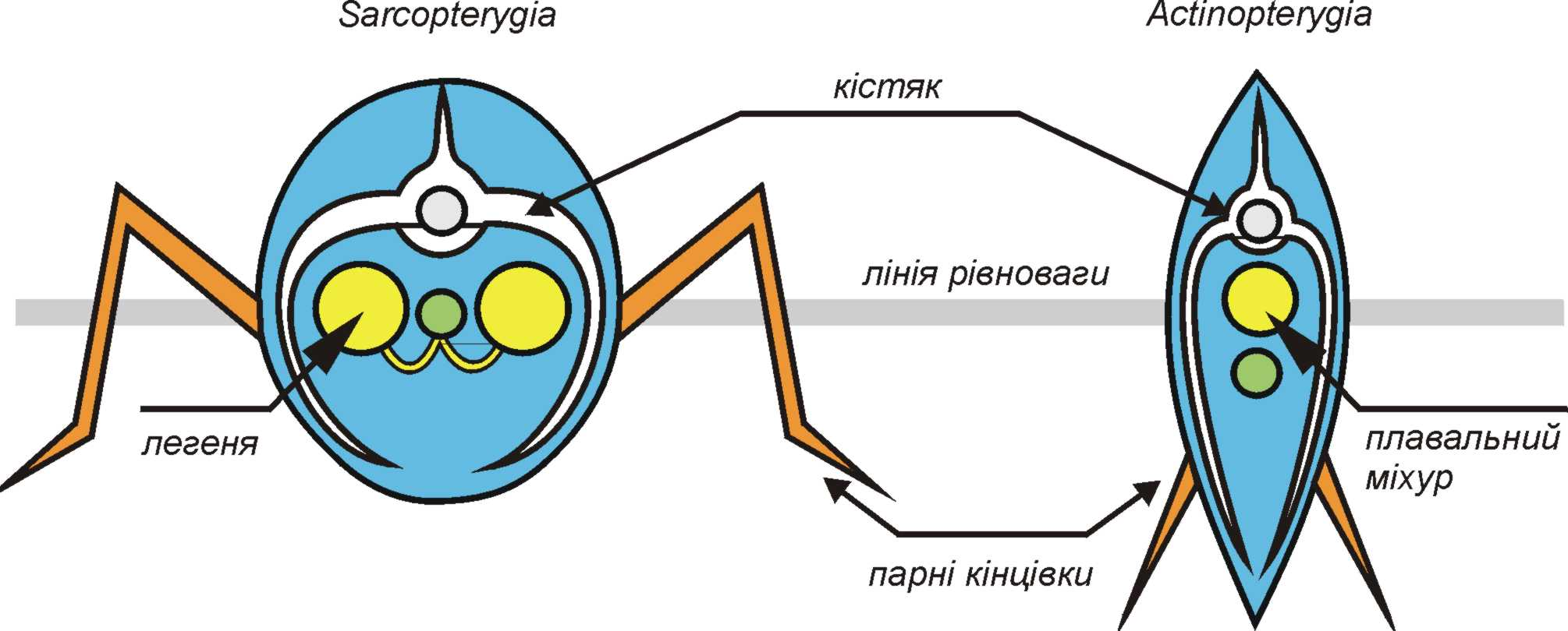 план будови лопатеперих (Sarcopterygii) (оригінальний рисунок)